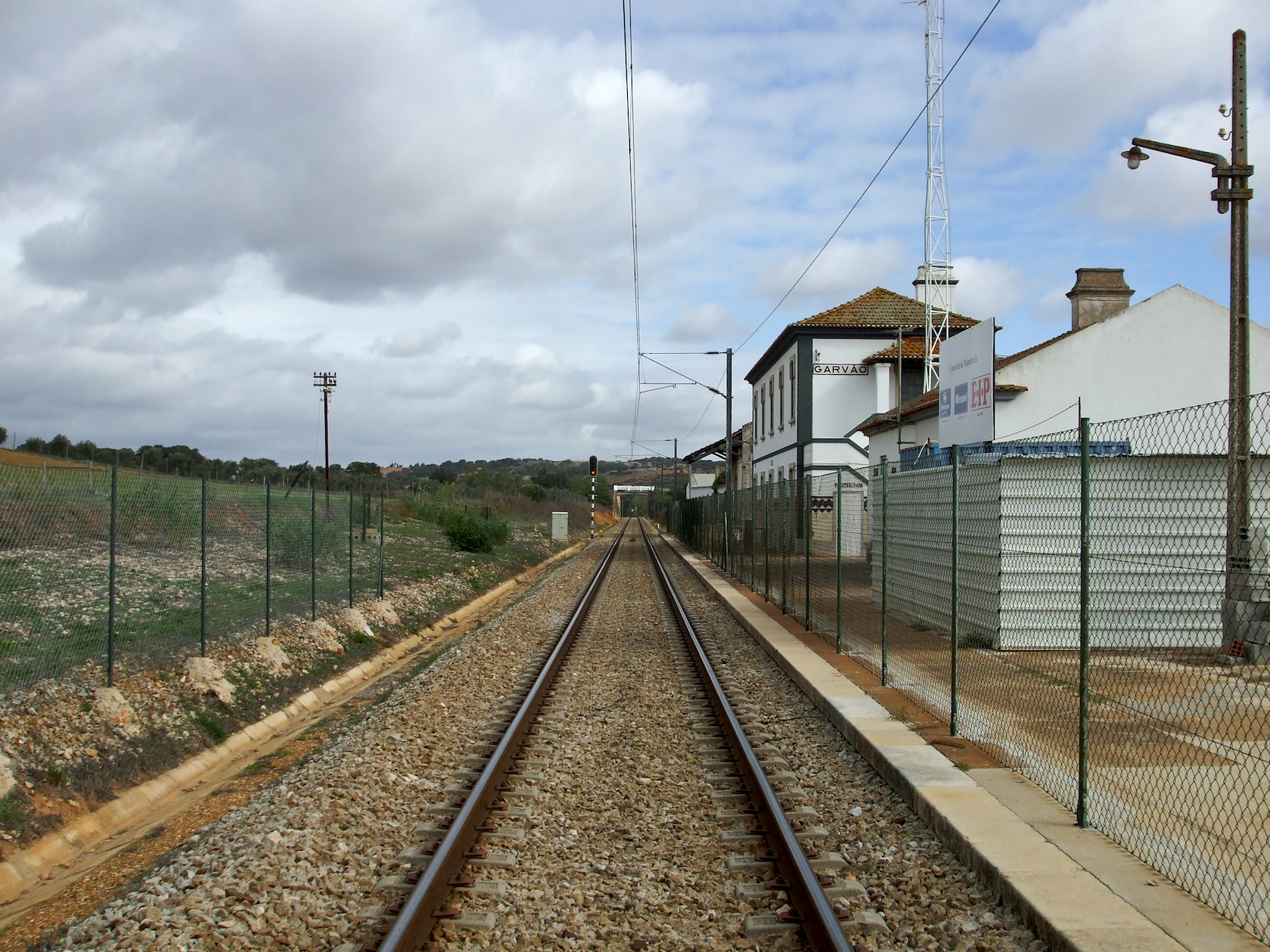 Tipo: A [Apeadeiro] Local: Garvão [Linha do Sul, PK 219] Data e hora: 6 de Novembro de 2009 [11h57]